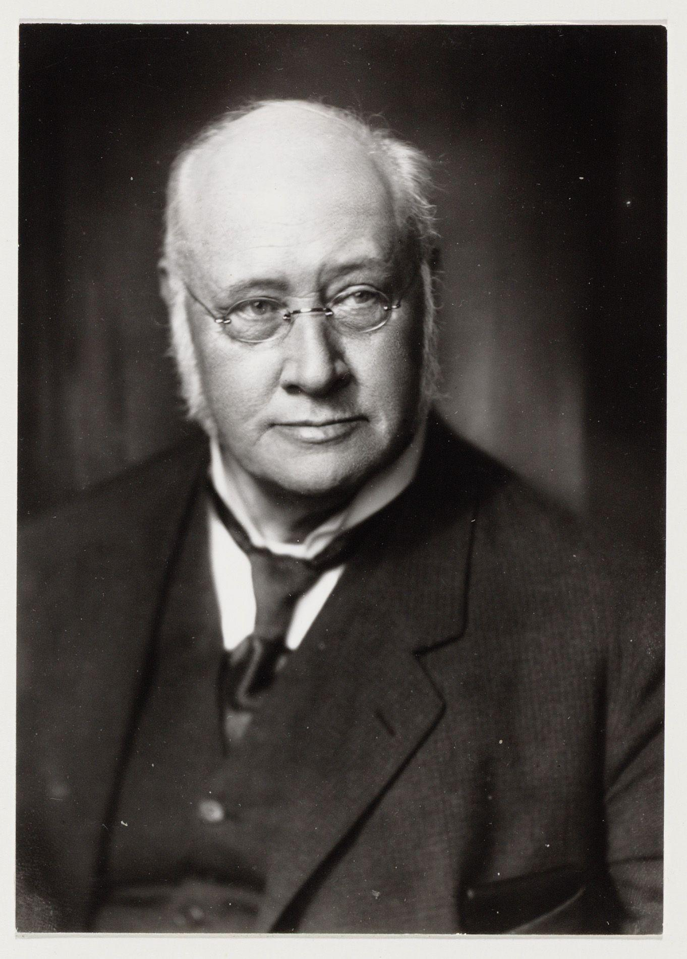 Beschrijving Dr. Rudolph Hendrik Saltet (1853-1927) Hoogleraar in de hygiëne aan de S.U. Documenttype foto Vervaardiger Merkelbach, Atelier J. Collectie Collectie Atelier J. Merkelbach Datering 1923 Inventarissen Afbeeldingsbestand B00000002376 Generated with Dememorixer